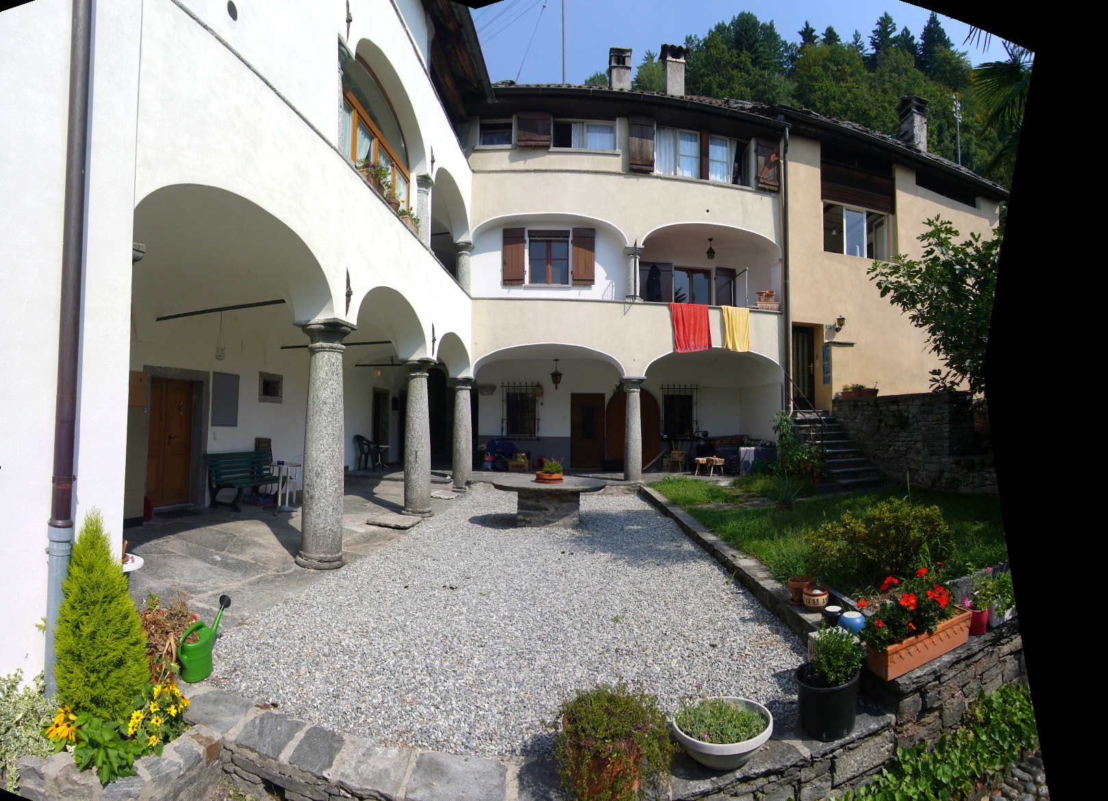 Corte di Casa Cavalli